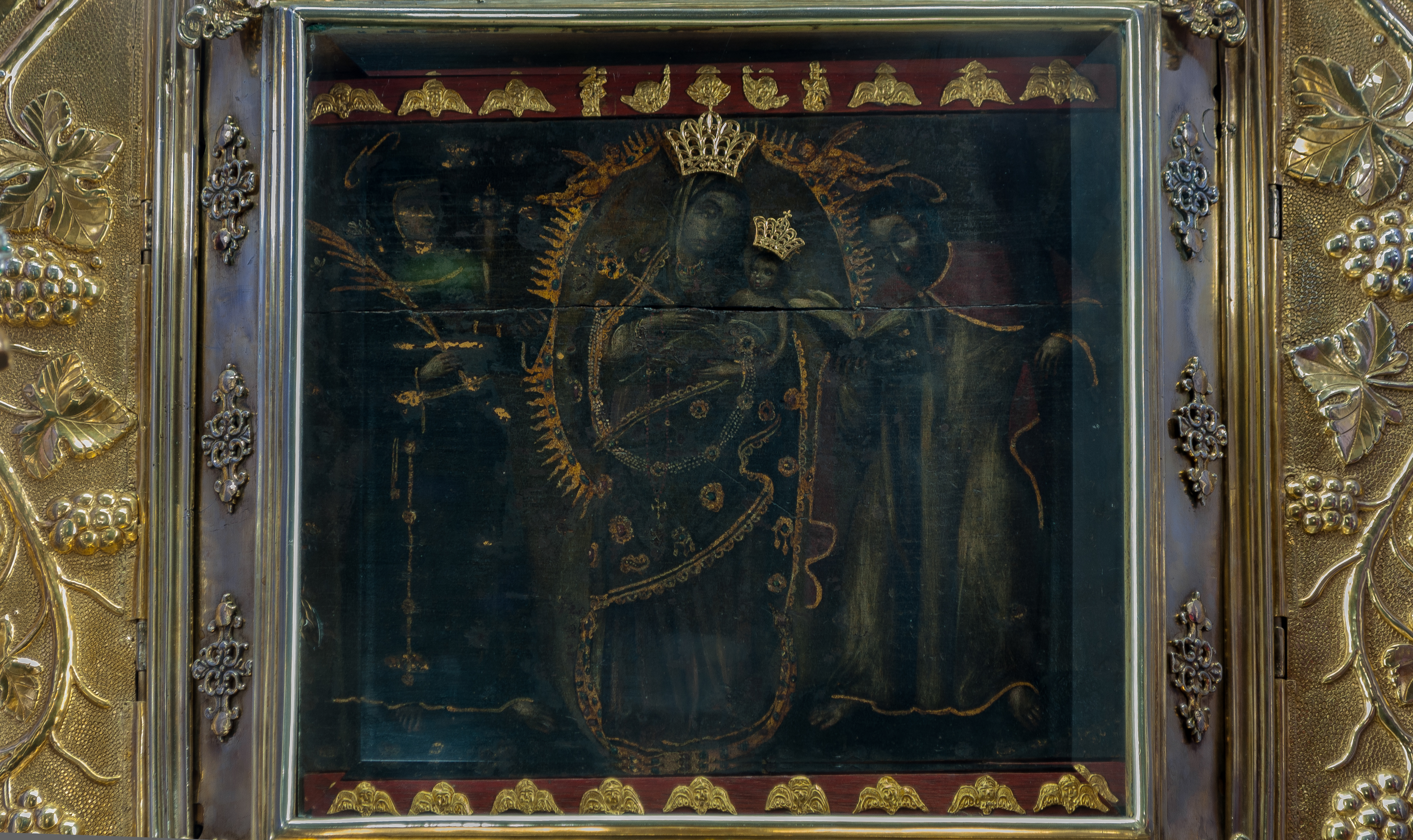 Virgen de la Chiquinquira en la Basílica de la Chinita, Maracaibo, Venezuela